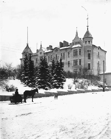 Frithiof Strandellin suunnittelema asuintalo Hjorten